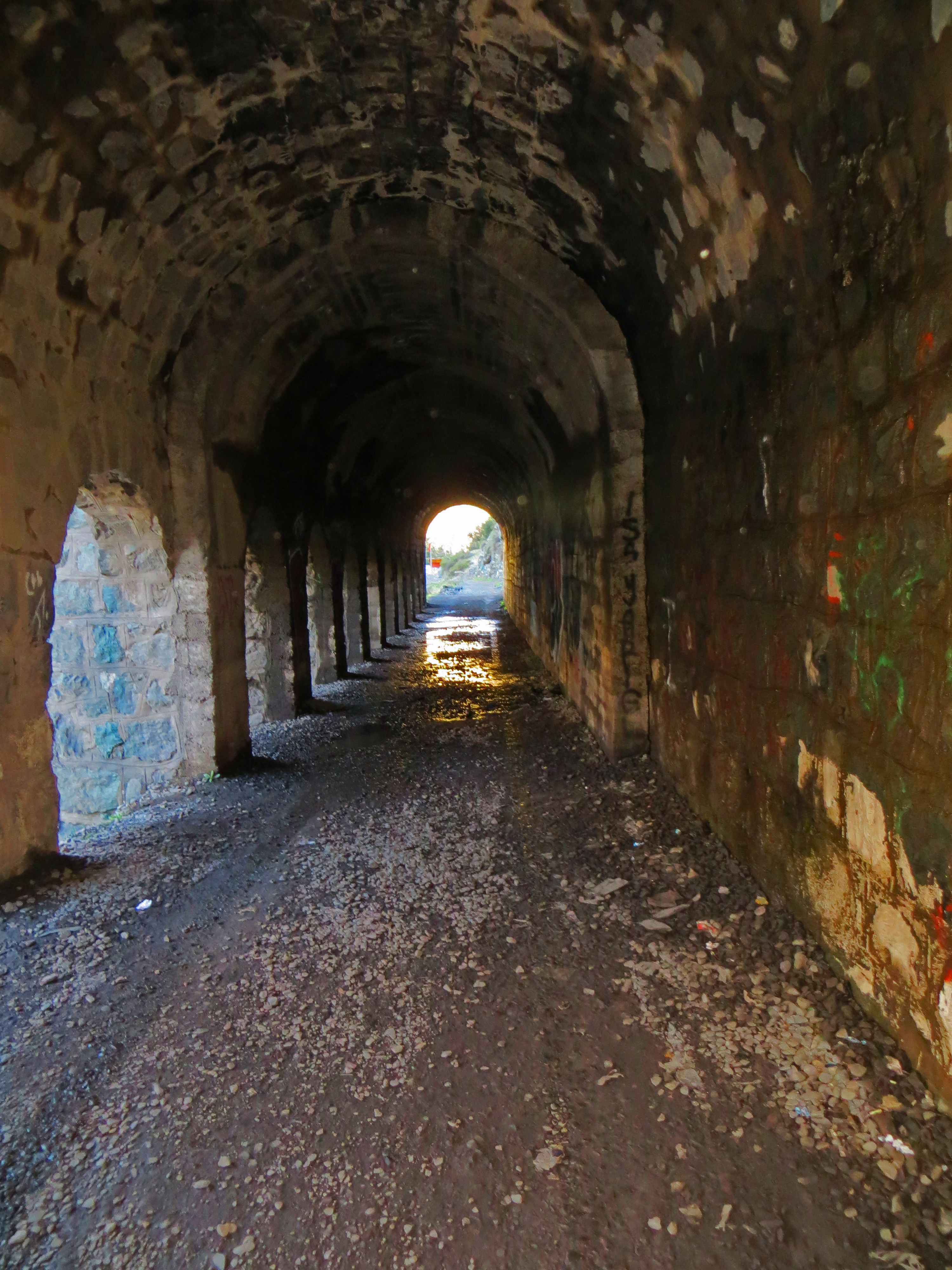 Construcciones existentes a lo largo del trazado del Ferrocarril de Puente Alto a El Volcán. This is a photo of a national monument in Chile: 881